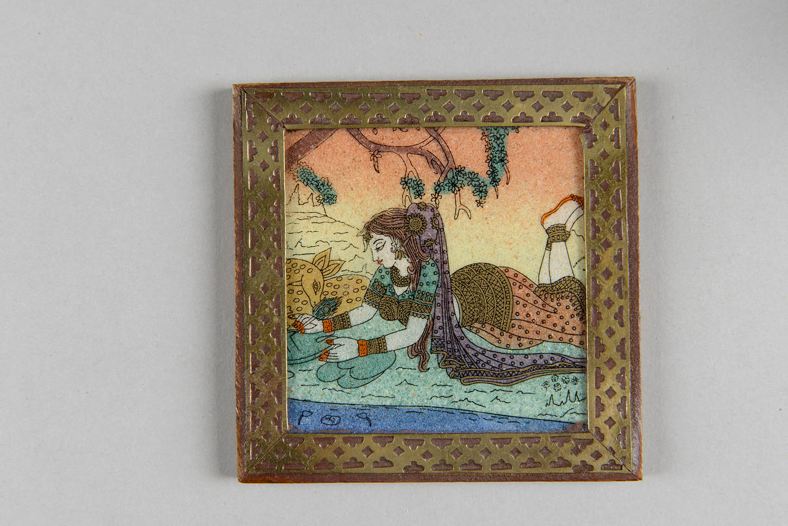 Przedstawienie w typie Dhanaśri ragini z cyklu ragamala (girlanda dźwięków). Przedstawienie nawiązuje do stylu miniatur z Radźastanu (XVII w.), do popularnego motywu w malarstwie miniaturowym - ragamala (girlanda dźwięków). Cykl ten składa się z 36 typów przedstawień nazywanych raga (6 typów) i ragini (po pięć do każdej ragi, w sumie 30 typów). Każdy typ przedstawienia ilustruje inną emocję.